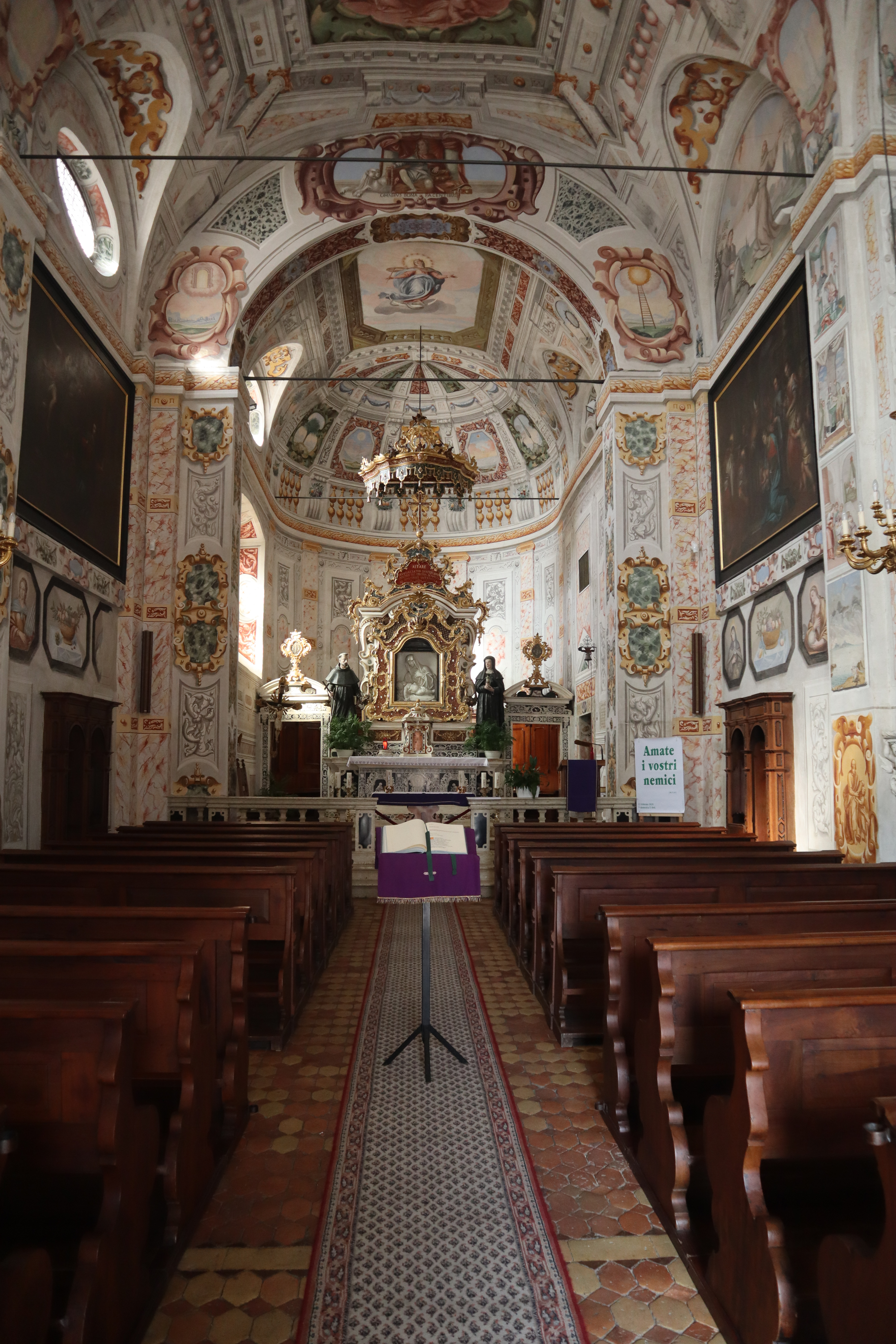 Chiesa della Beata Vergine Maria a Nogaredo. Interno.